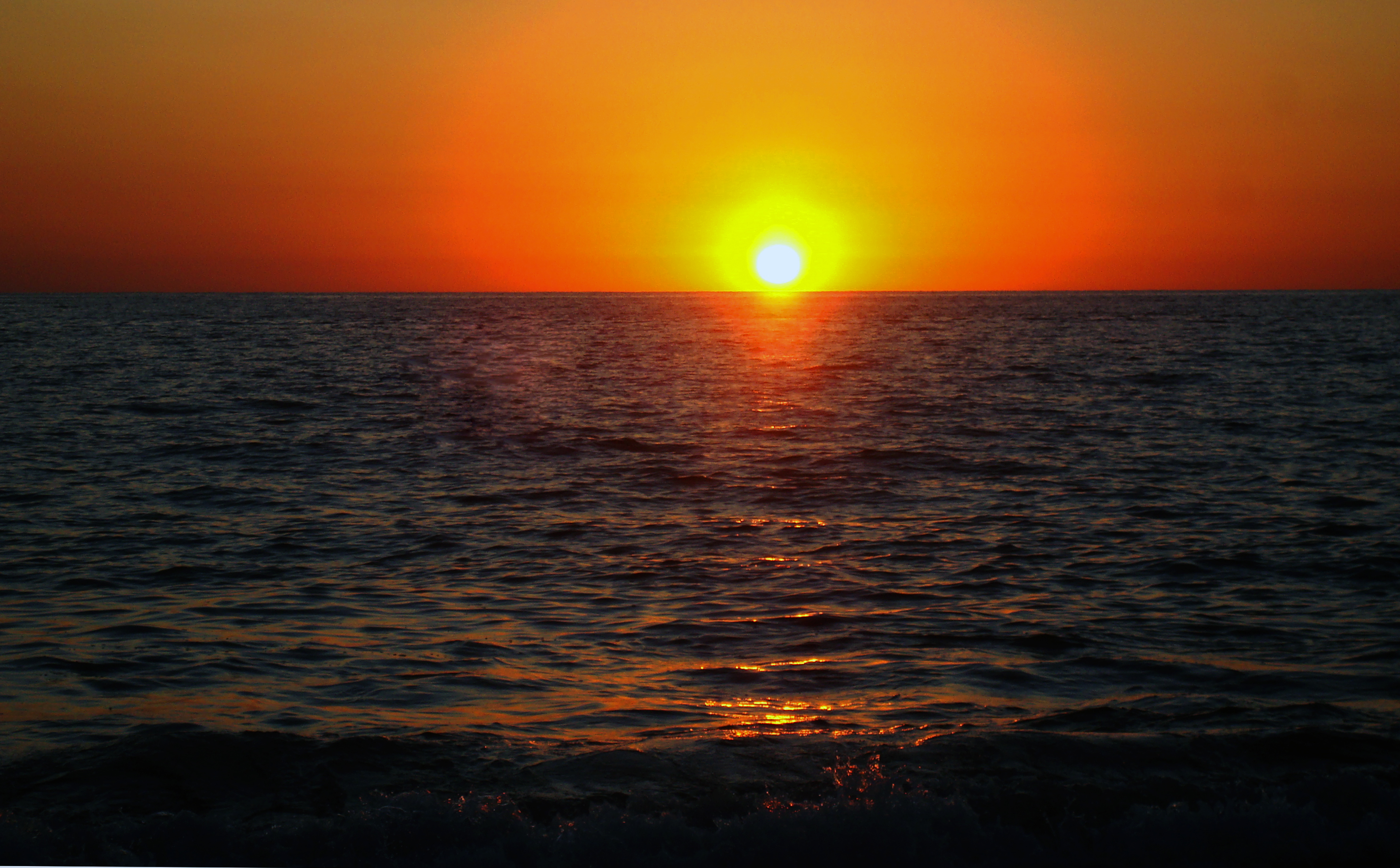 Atardecer en la costa de Puerto Vallarta.